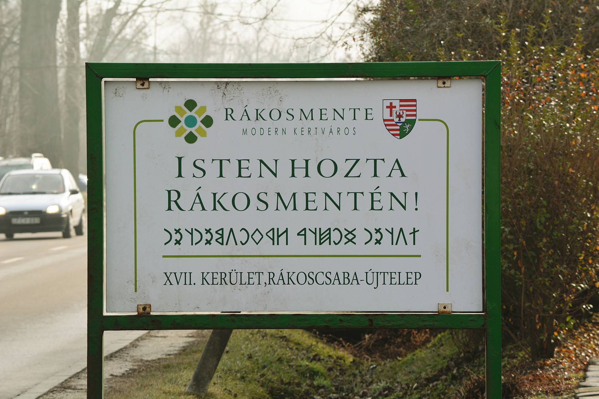 Rákoscsaba-Újtelep határát jelző új várostábla.